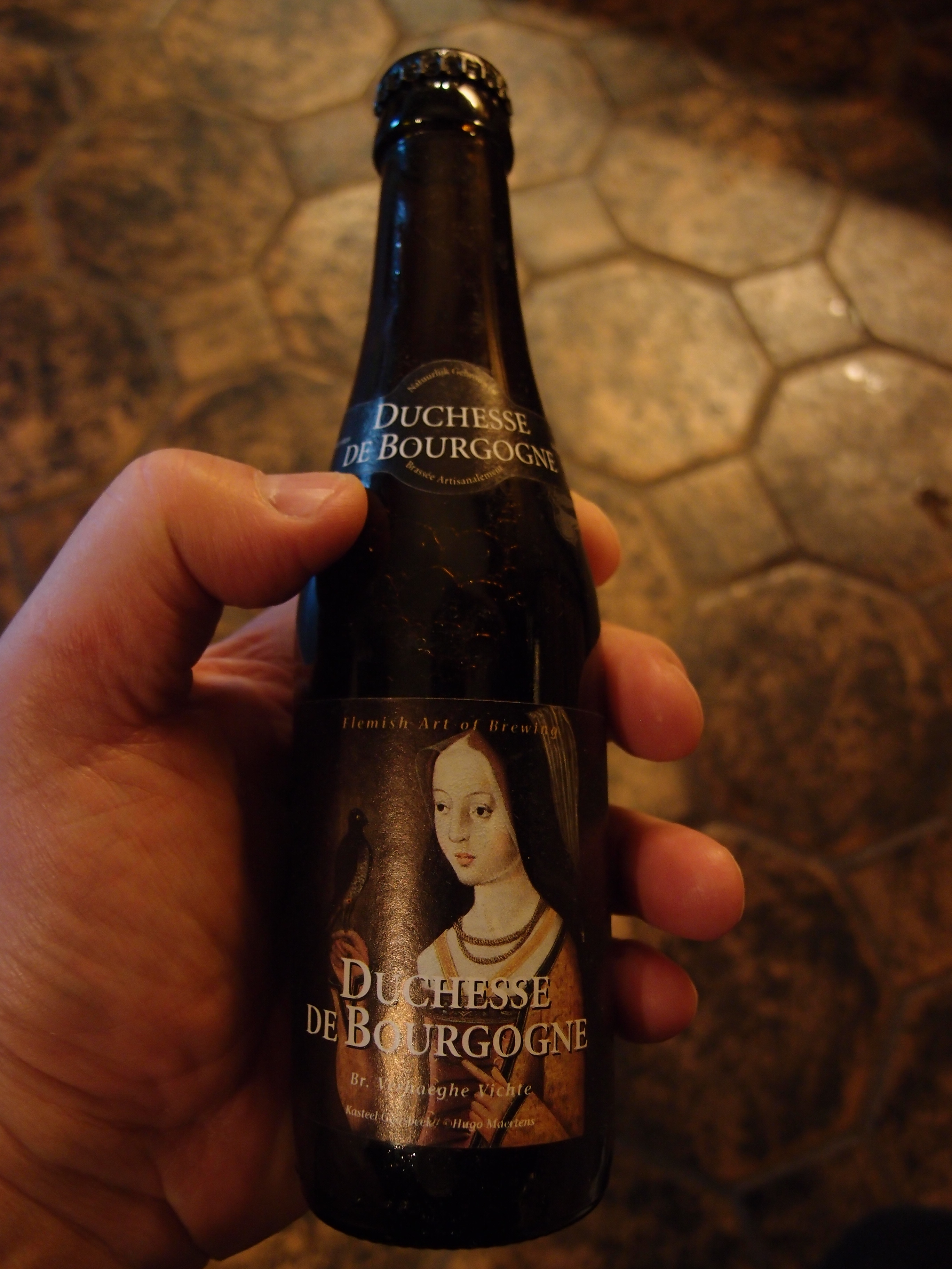 Duchesse De Bourgogne (belgisches Bier, Brauerei: Verhaeghe) Datum: 04.02.2012 Urheber: M. Pfeiffer alias Benutzer:Gordito1869 Quelle: privates Fotoarchiv des Urhebers